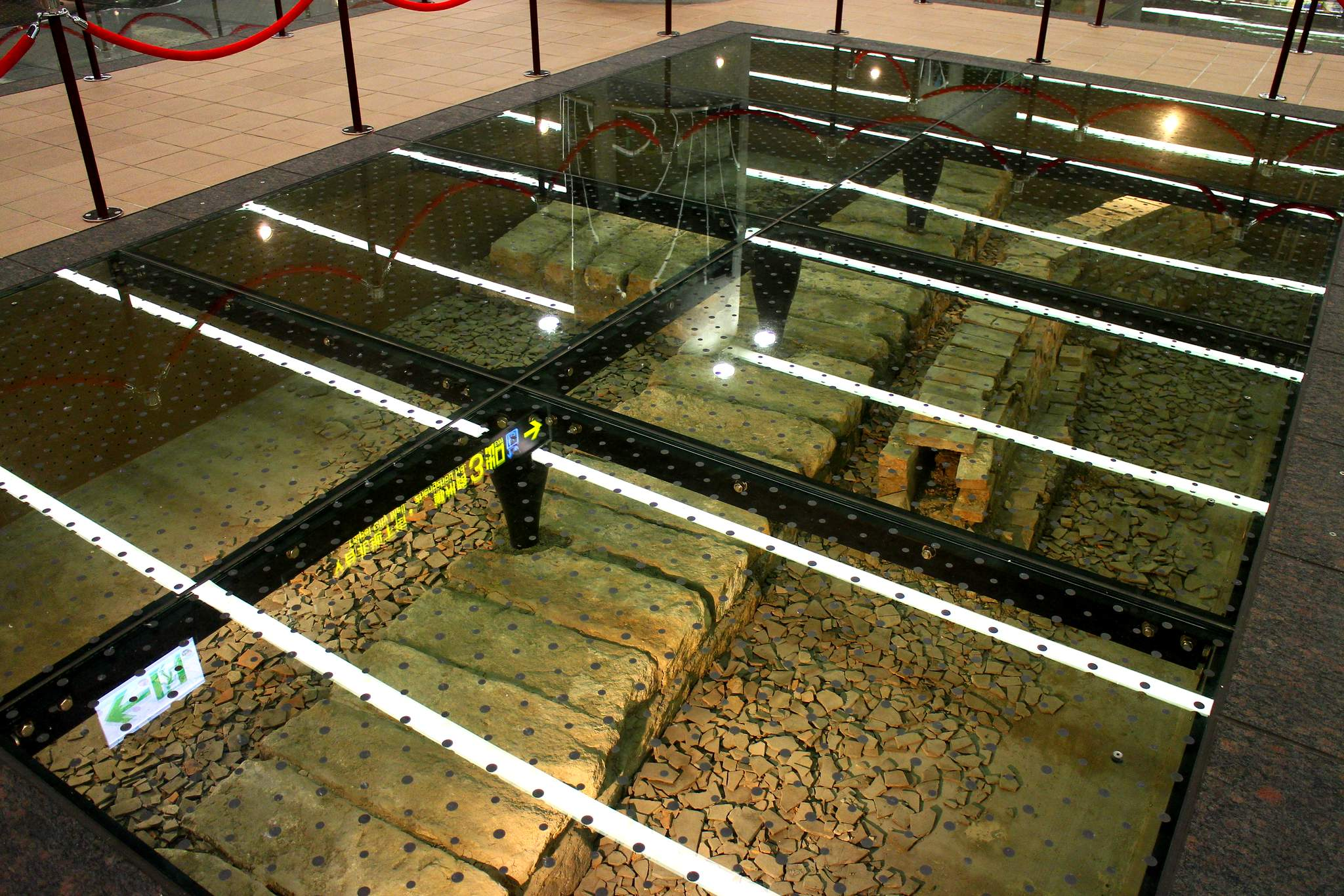 台北捷運松山線-北門站地下一樓歷史文物展示區展出歷史遺跡